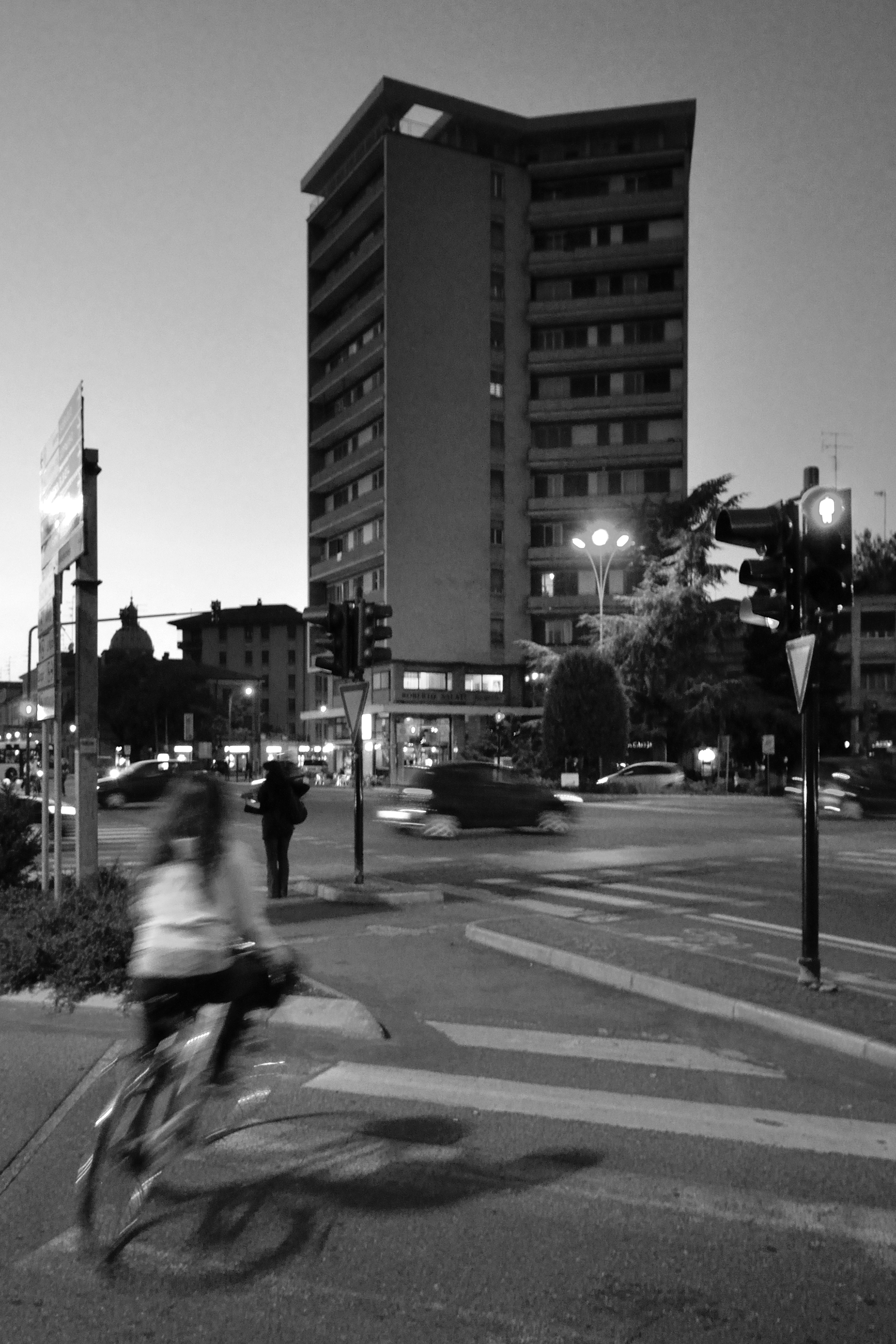 Grattacielo - Porta San Pietro (RE) Italia - 7 Ottobre 2010